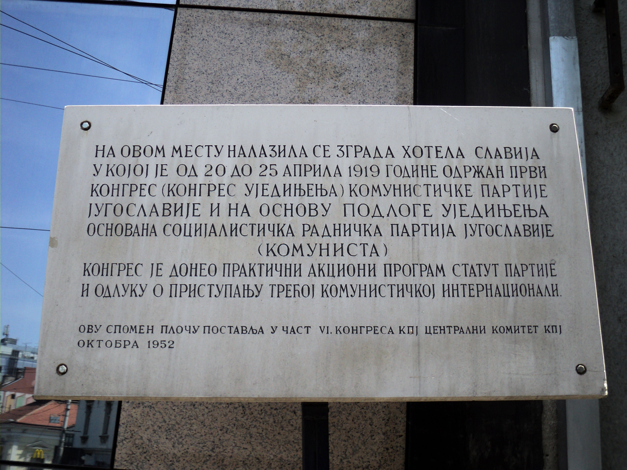 Spomen-ploča pred hotelom Slavija u spomen održavanja Prvog kongresa SRPJ u toj zgradi u Beogradu 1919. godine. Self-made. Maj 2011.